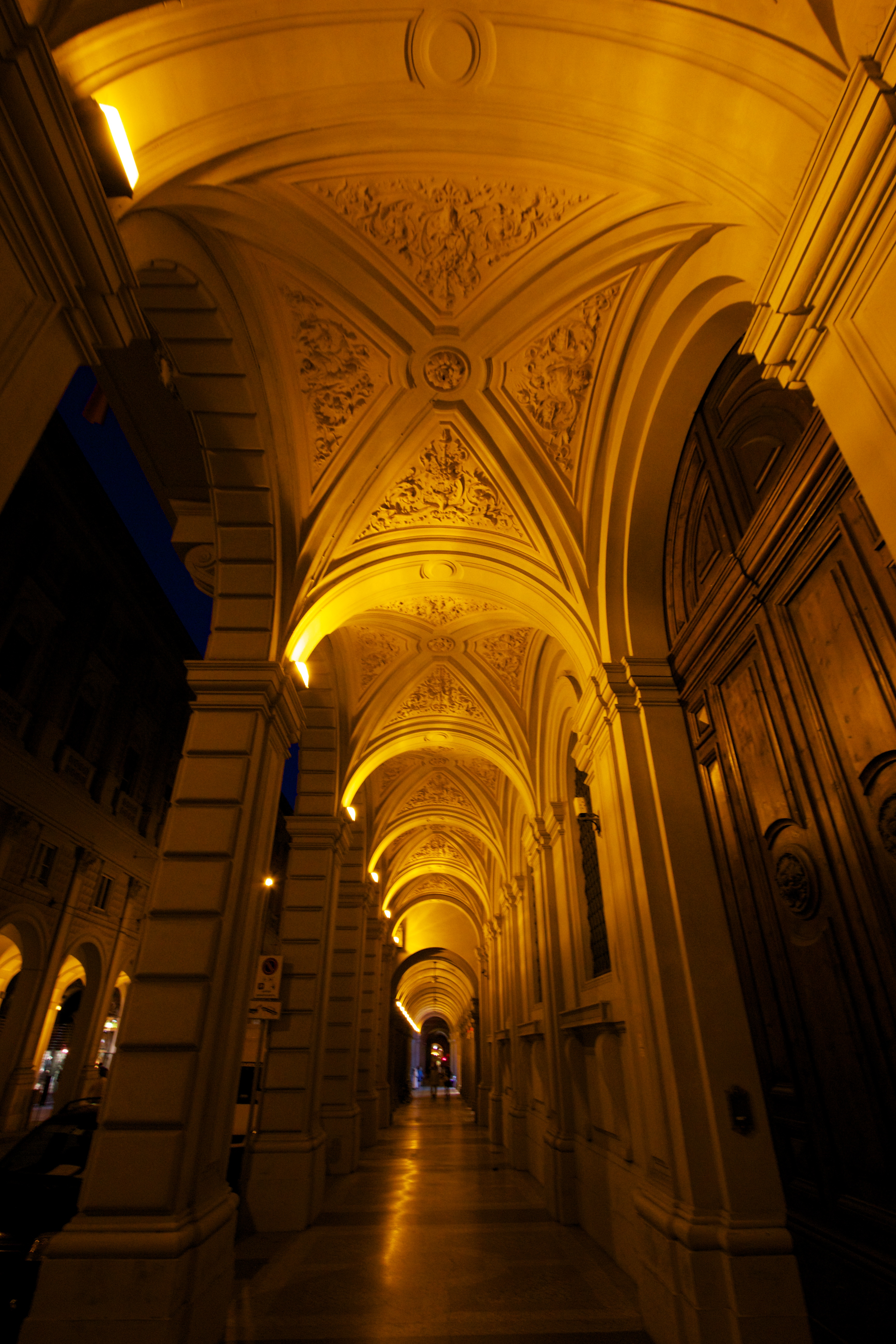 Portici (esclusi San Luca e Alemanni) This is a photo of a monument which is part of cultural heritage of Italy.